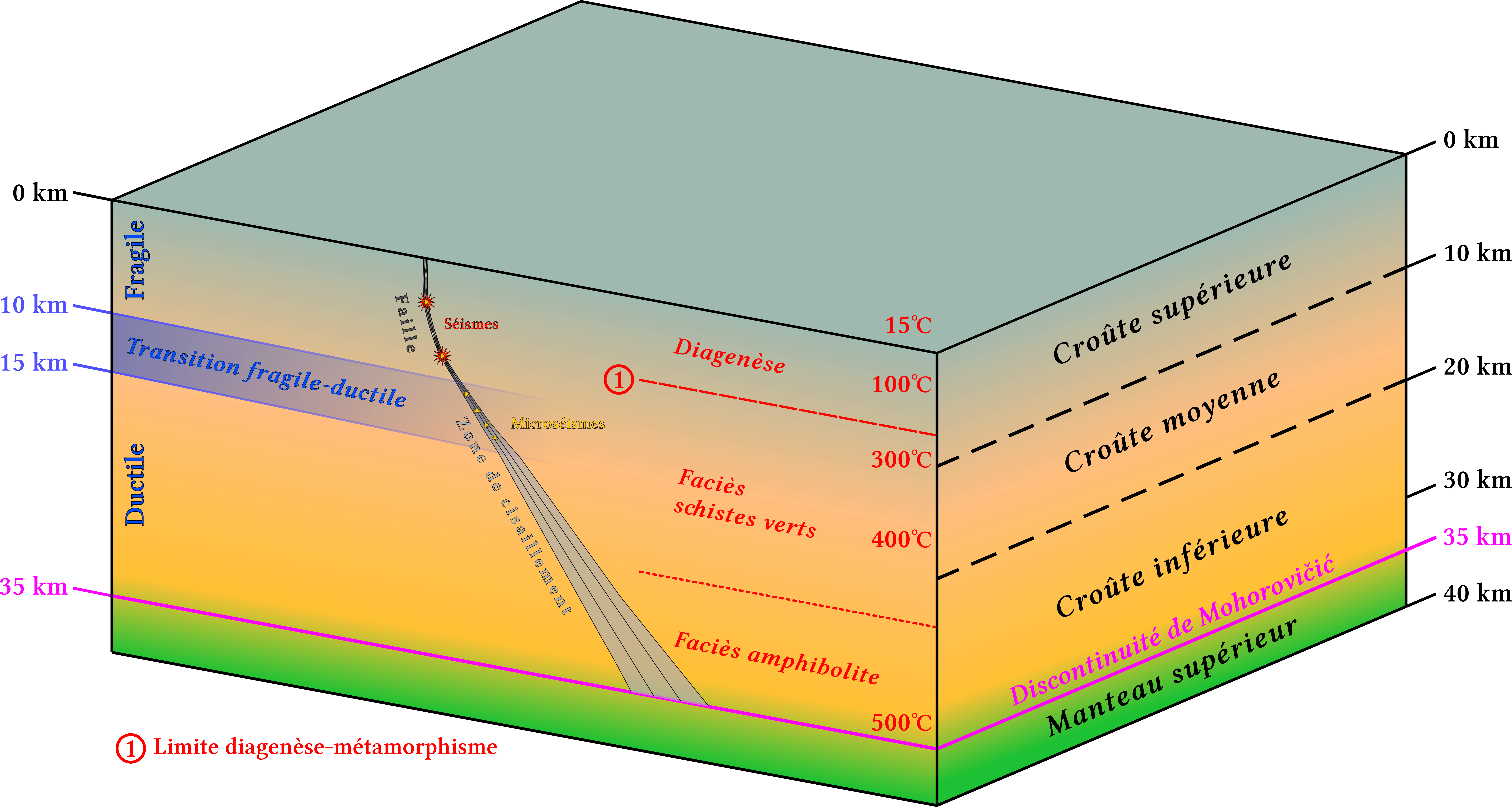 Bloc-diagramme de la structuration verticale de la croûte continentale.